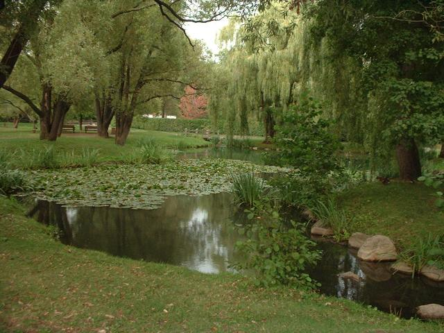 Jardim Botânico de Montreal.